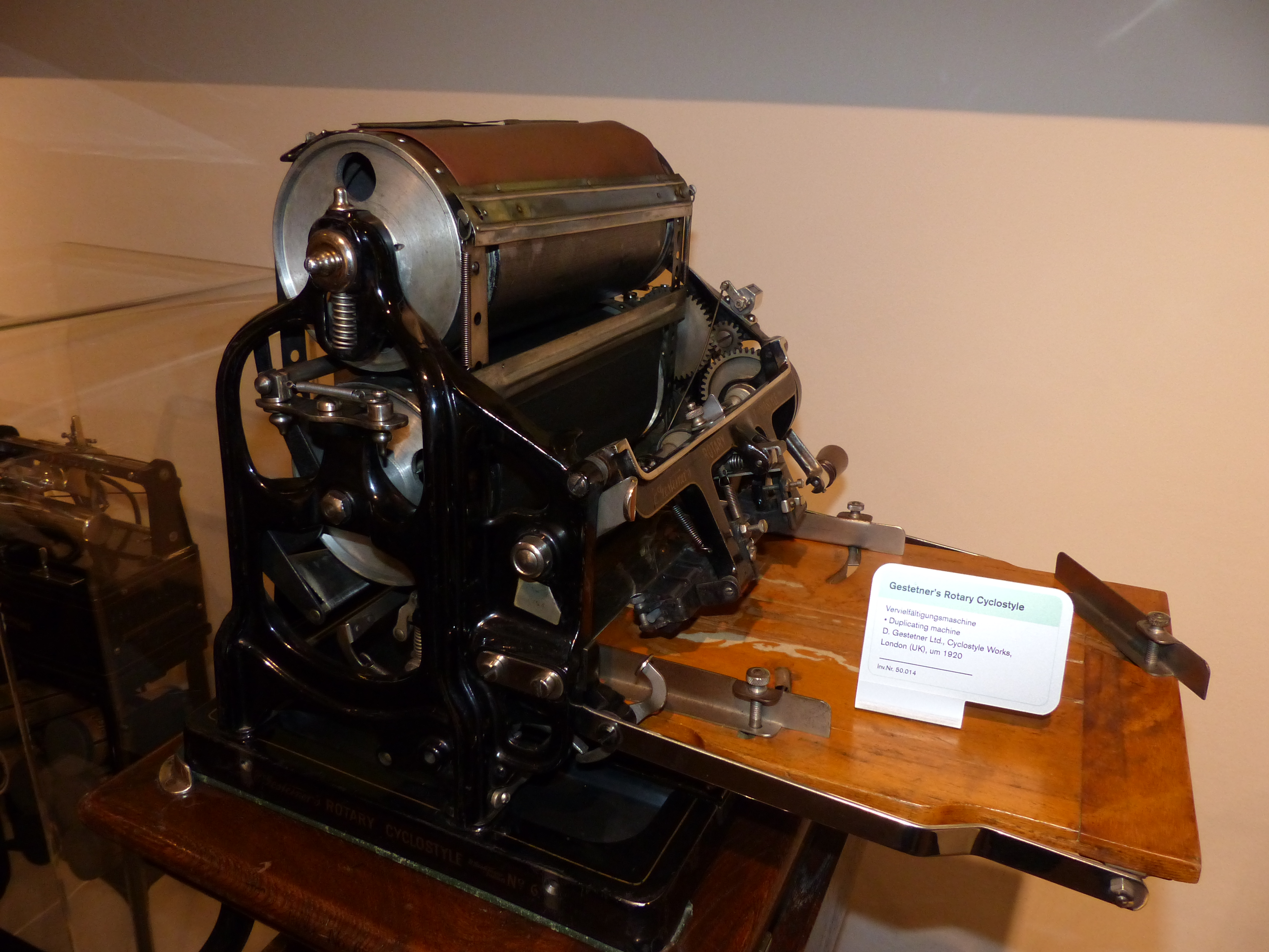 Vervielfältigungsmaschine Gestetner Rotary Cyclostyle, London, um 1920, Exponat im Technischen Museum Wien